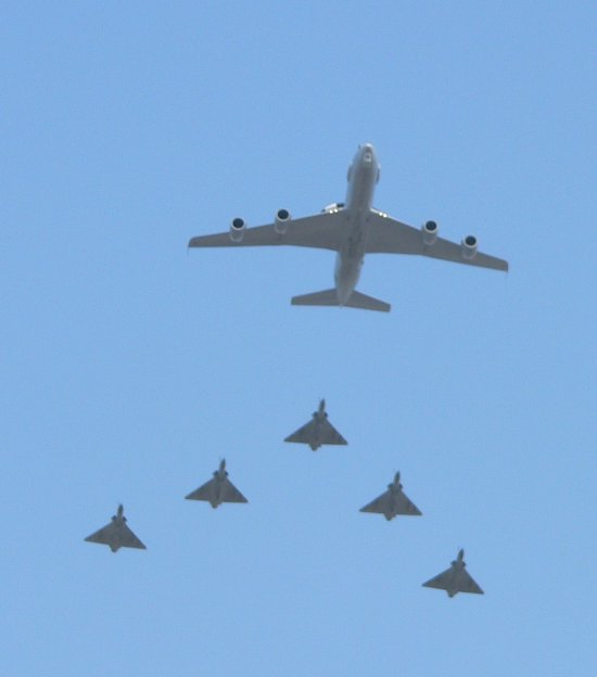 Military parade, Avenue des Champs-Élysées, 14 July 2006